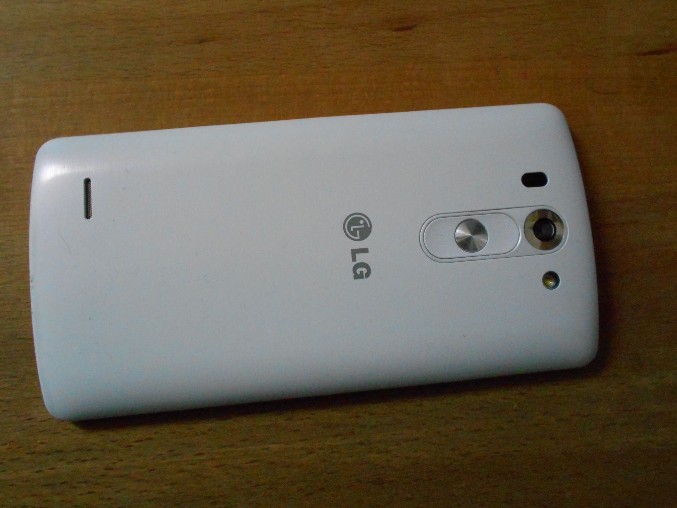 DE: Rückseite eines Smartphones mit unsichtbar NFC-Fähigkiet / EN: Backside_of_a_Smartphone_with_invisible_NFC_capabilityes.jpg